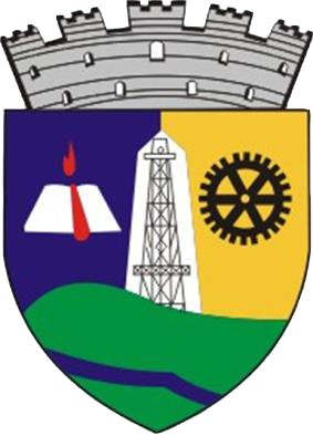 Stema Moreni format